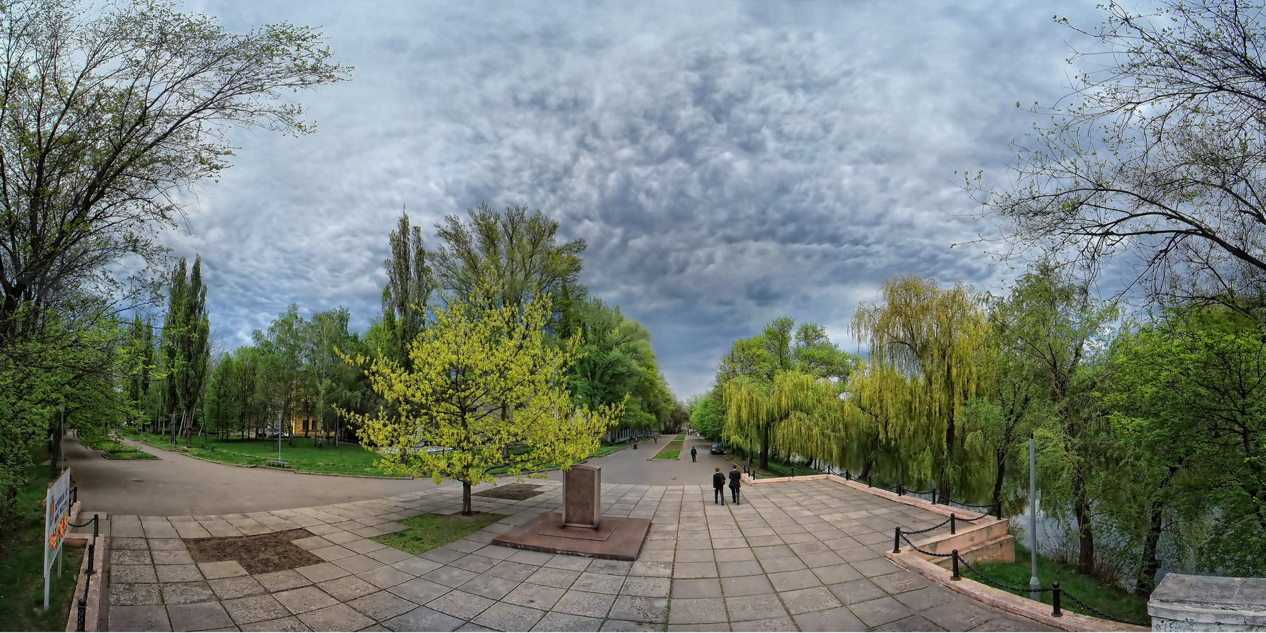 Пам’ятний знак на честь 200 річчя Кривого Рогу, Кривий Ріг, парк імені Газети «Правда»(вул. Грабовського)